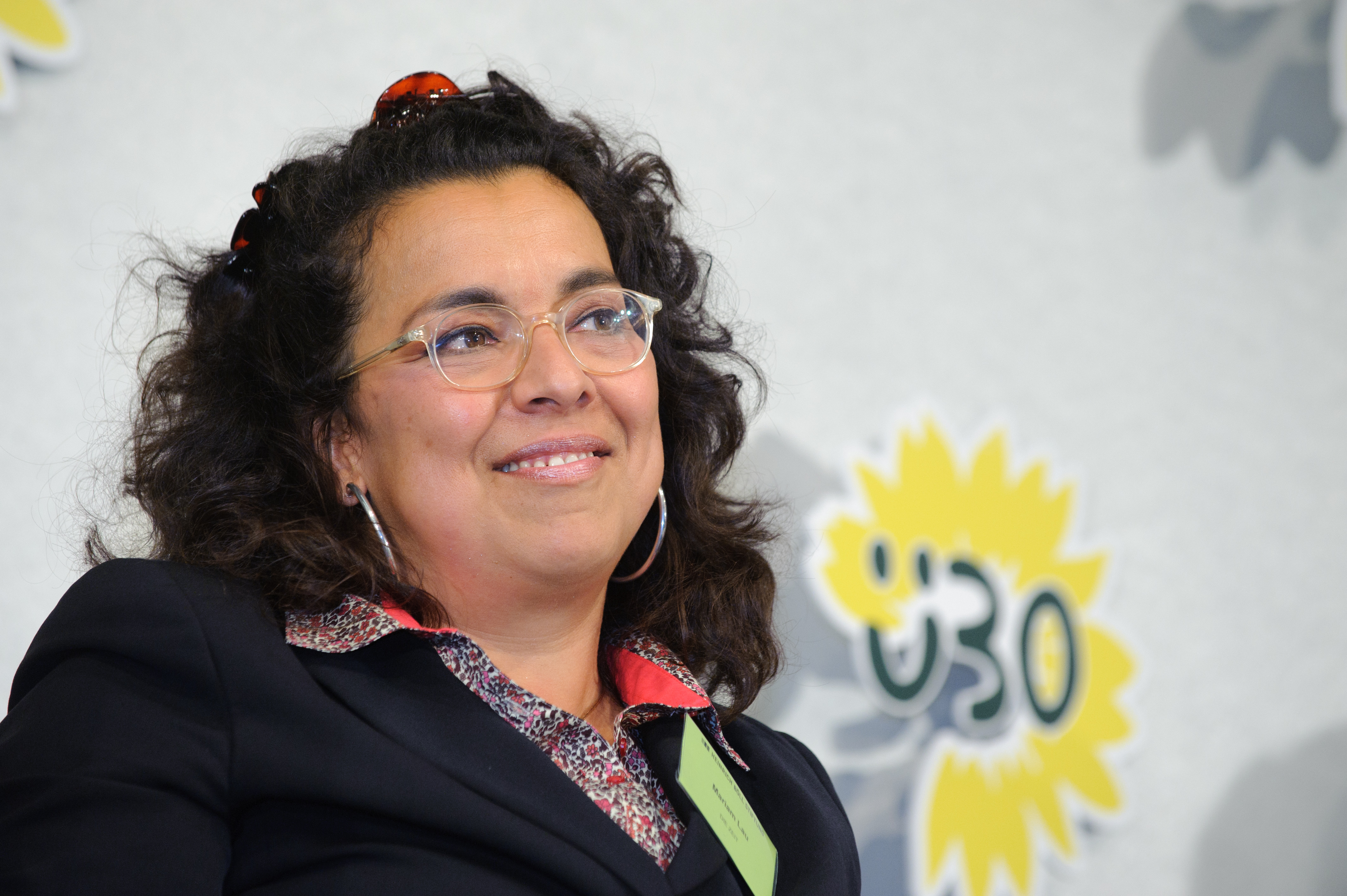 Foto: CC-BY-SA Stephan Röhl Die Bilder enstanden bei der Veranstaltung: "Ü30! Die Grünen vor neuen Herausforderungen" 30 Jahre Grüne. Die einst kleine Ökopartei ist zu einer festen Größe in der politischen Landschaft geworden. Ökologie, nachhaltiges Wirtschaften, Umweltschutz, erneuerbare Energien und Gleichstellung sind im gesellschaftlichen Mainstream angekommen. Sie werden deshalb auch von anderen Parteien aufgegriffen. Selbst sind die Grünen im Stimmungshoch, nicht nur in der Hauptstadt. Wie können sie dieses inhaltlich und programmatisch ausfüllen? Die Heinrich-Böll-Stiftung bringt führende Grüne mit herausragenden Gästen aus Kultur, Wissenschaft, Unternehmen und Gewerkschaften zusammen, um der Partei einen Spiegel vorzuhalten und gemeinsam darüber zu reden, welches die großen grünen Themen der nächsten zehn Jahre sind.